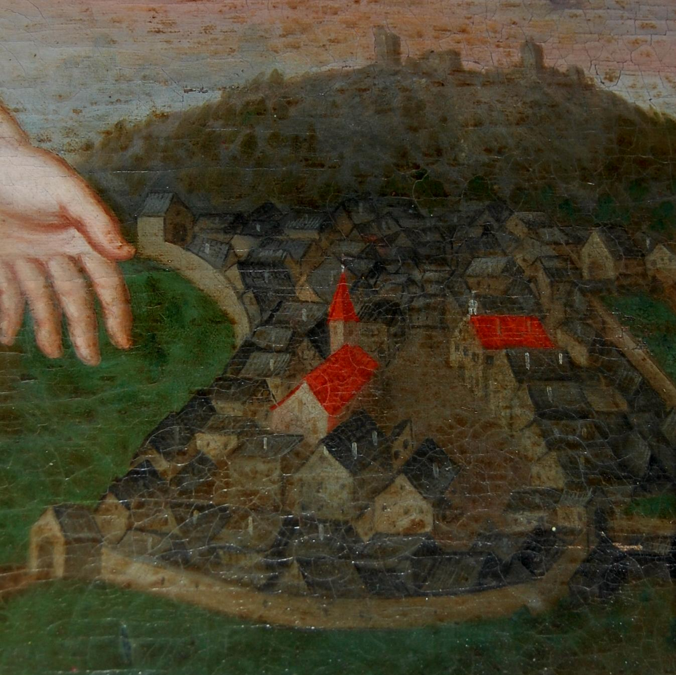 Ansicht des Marktes Tännesberg aus dem Jahre 1680 auf dem linken Seitenaltar der Wallfahrtskirche Sankt Jodok in Tännesberg, Landkreis Neustadt an der Waldnaab